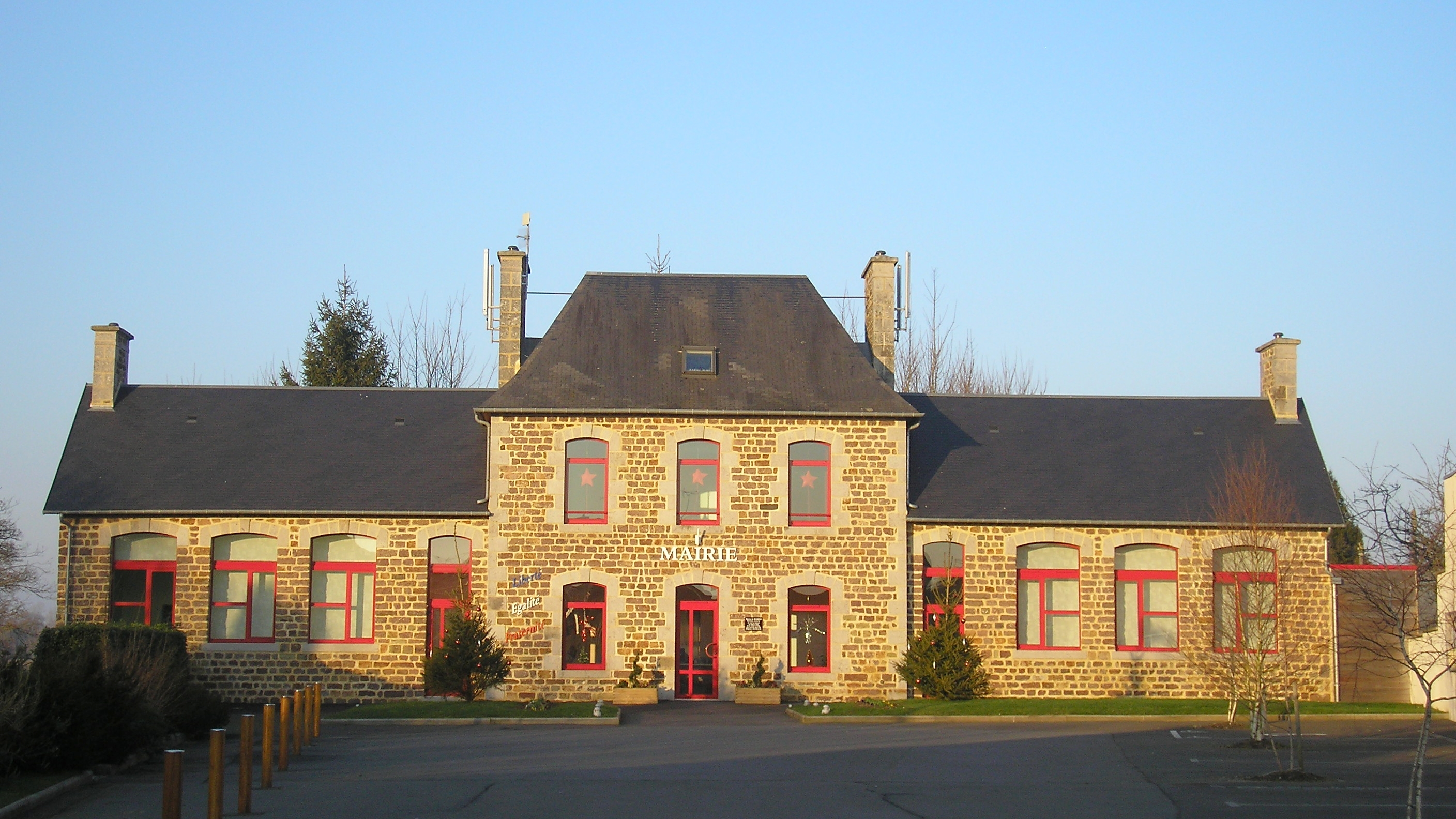 Hambye (Normandie, France). La mairie.